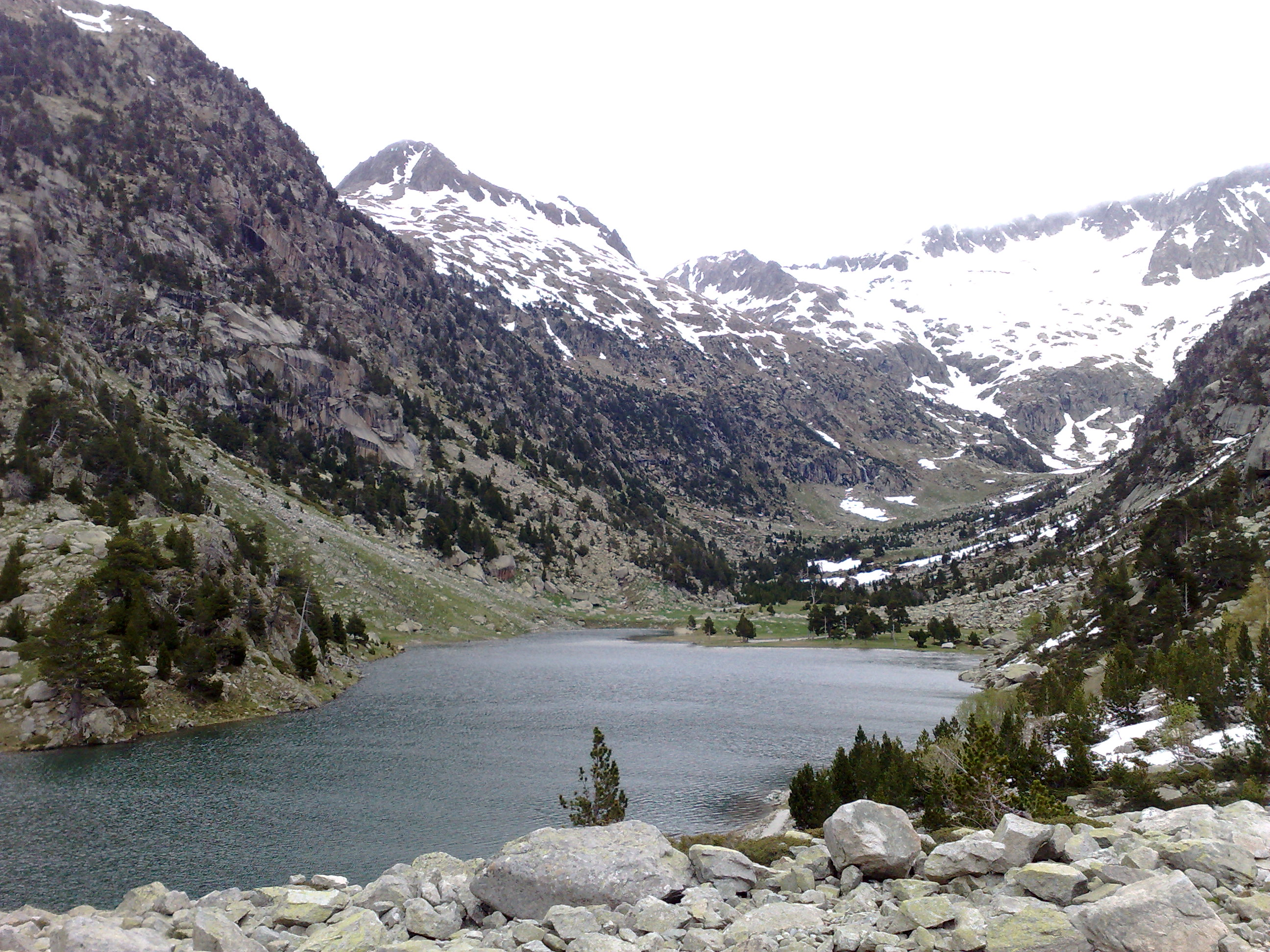 Estany de Besiberri